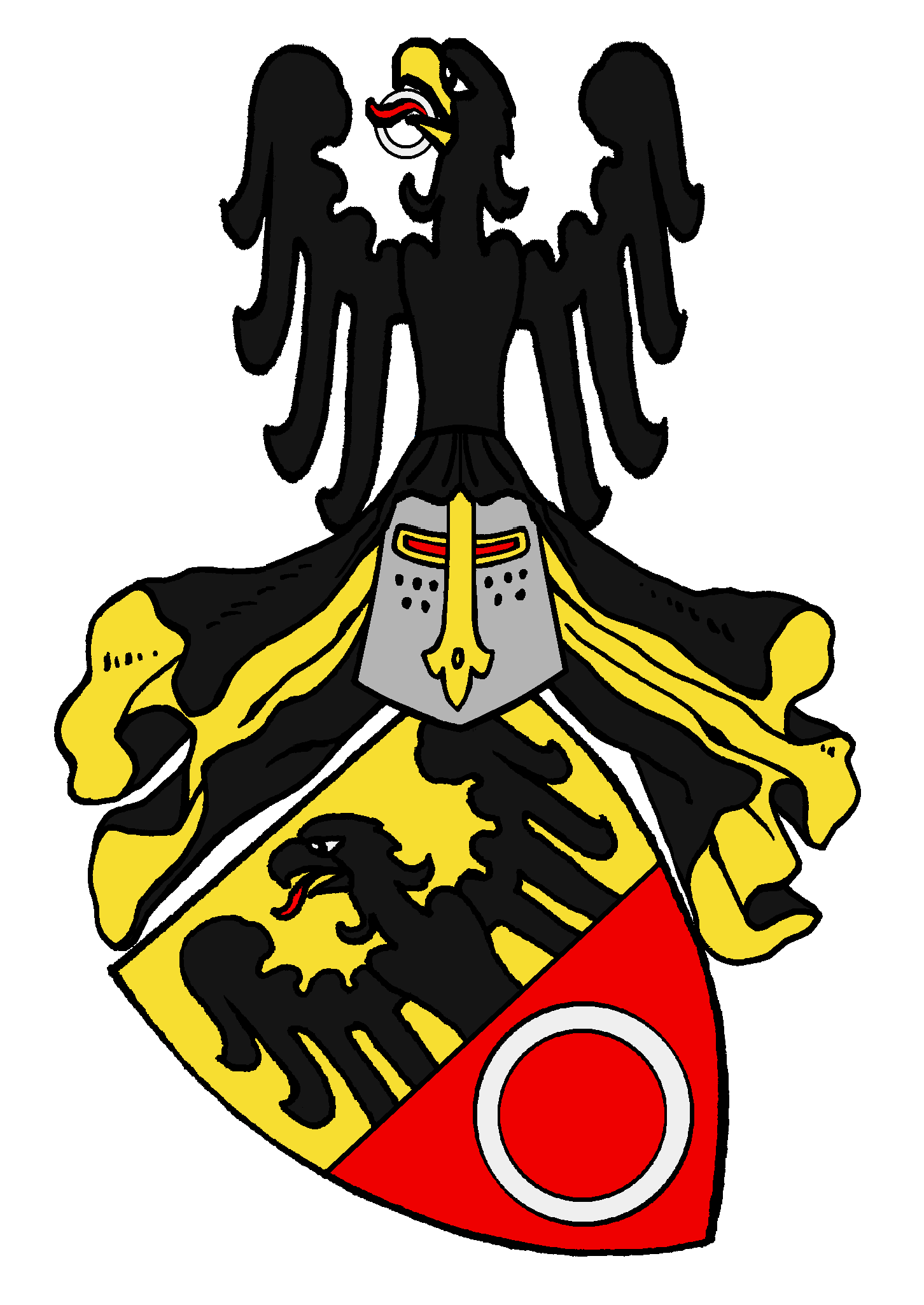 Ursprüngliches (vor 1300) Stammwappen der Nürnberger Patrizierfamilie Pfinzing von Henfenfeld, späterhin irrtümlich der patrizischen Pfinzing-Vorfahrenfamilie Geuschmid (im 13. Jahrhundert auch: „Gewsmyd“) zugeschrieben (dabei hatten die Pfinzing um 1300 tatsächlich ihr altes Adler(„Geier“)-Ring-Wappen abgelegt, und das Gold-Schwarz geteilte Wappen gerade der Geuschmid angenommen -also gerade umgekehrt) [1] , [2] , [3]